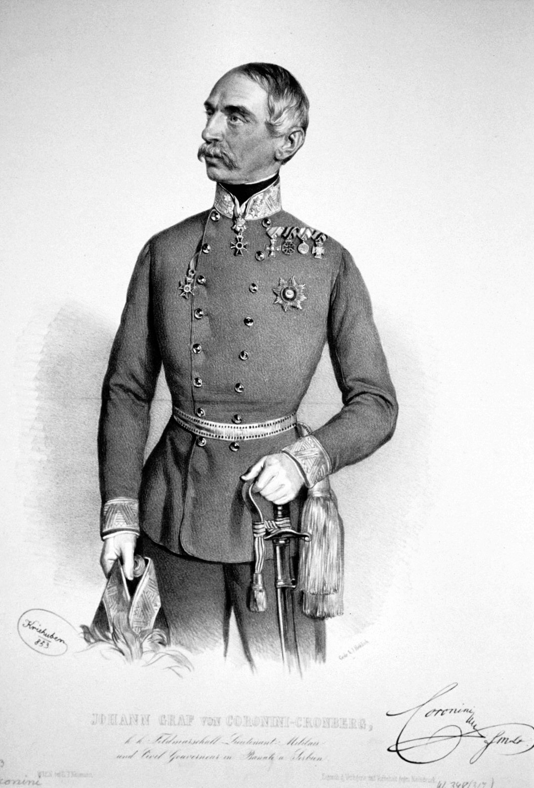 Johann Graf Coronini-Cronberg (1794-1880), k. k. Feldzeugmeister, Ritter des Goldenen Vlieses. Lithographie von Josef Kriehuber, 1853